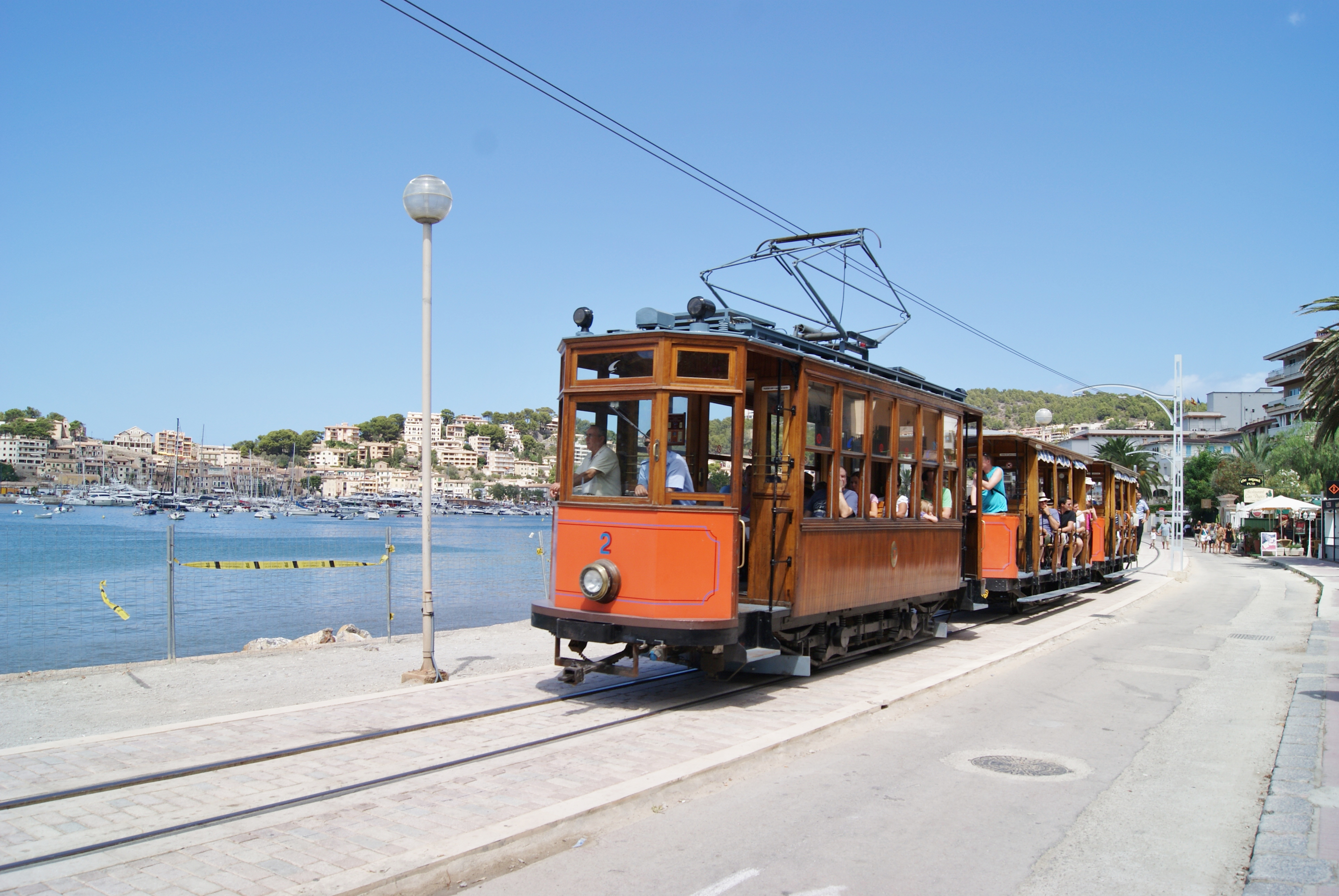 Trams du Port-Soller (Espagne) Photo. Trams aux Fils.